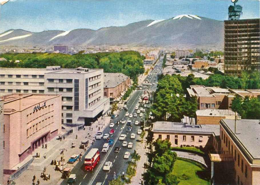 خیابان فردوسی، ۱۳۴۱ خورشیدی (۱۹۶۲ میلادی) - تصویر کارت پستال